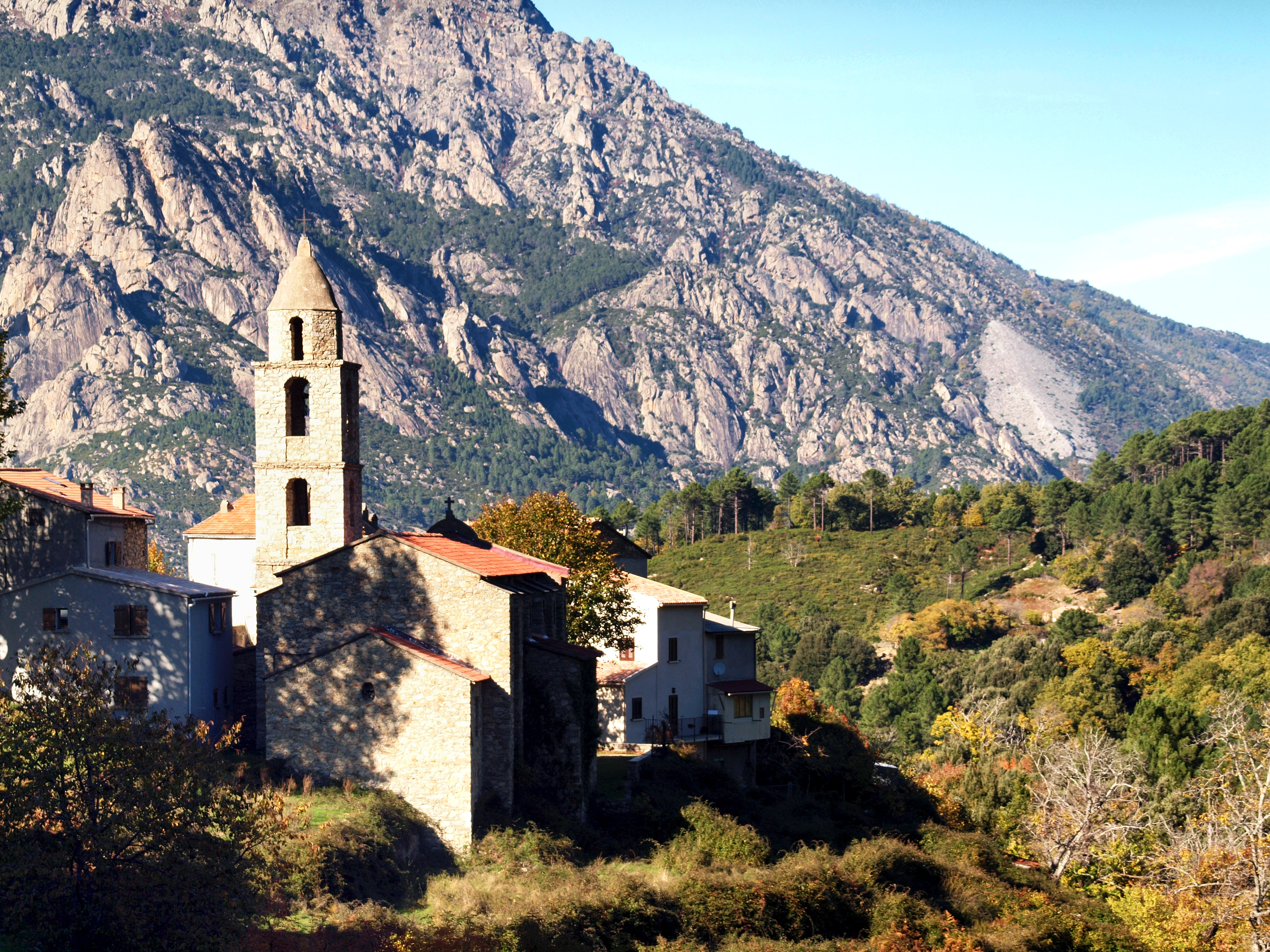 Muracciole, Centre Corse - L'église paroissiale de l'Assomption du XVIIe siècle. À droite de la photo, le grand cône blanc dit Razzo-Bianco au pied duquel se trouve l'ancienne carrière de marbre de Venaco.